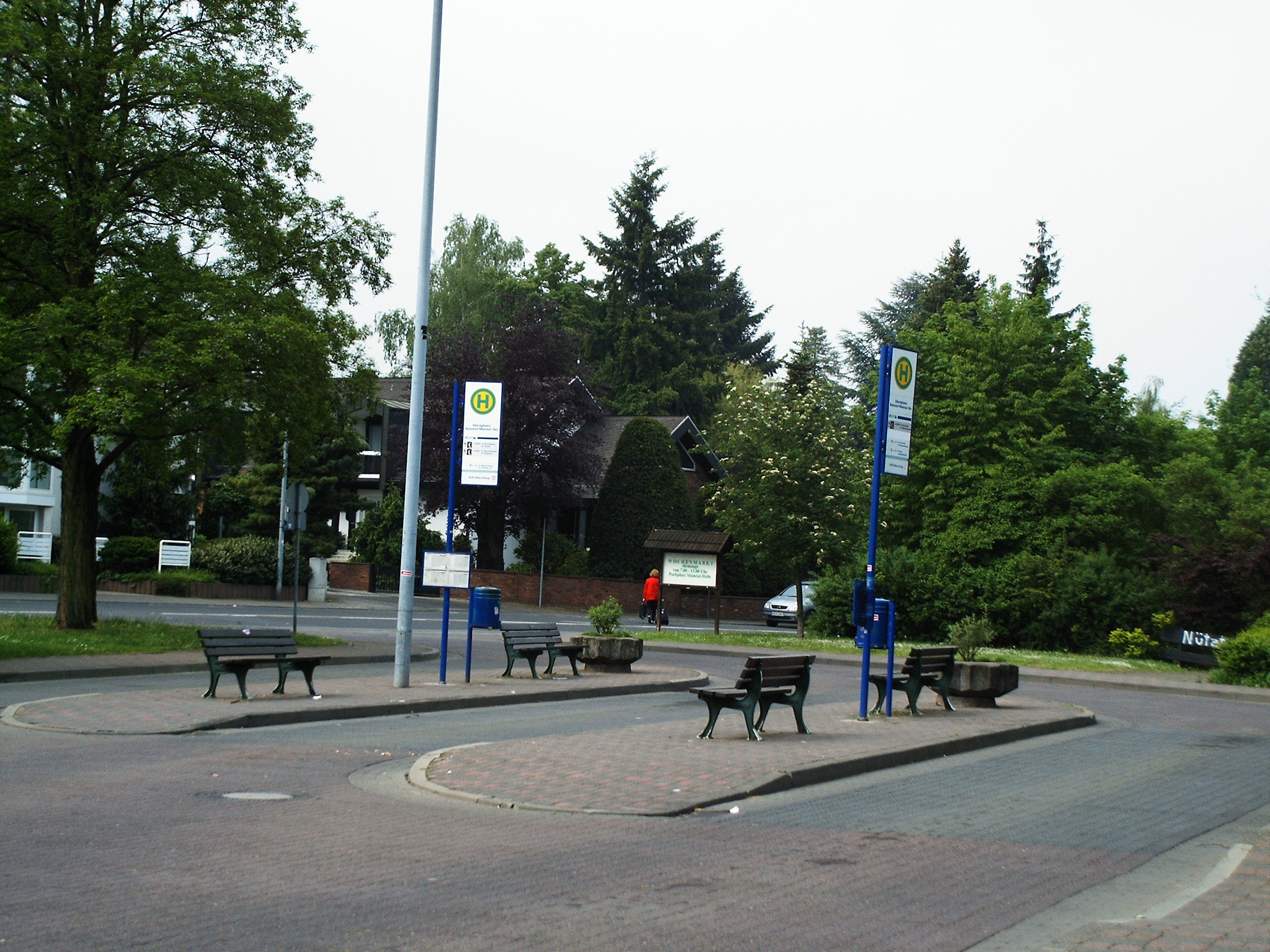 Busbahnhof am Bahnhof Maintal Ost in Maintal